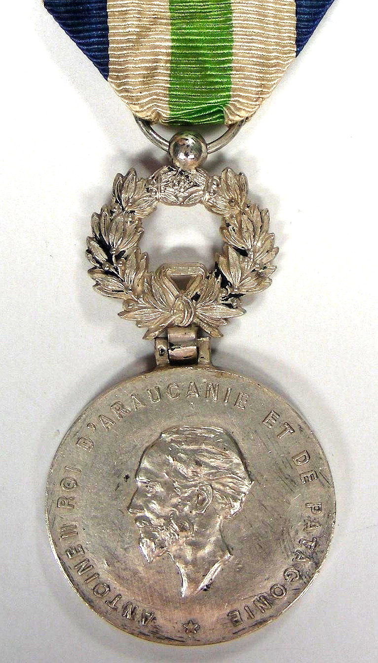 Orden de la Cruz Estelar del Sur, de Antonio II de Araucanía y Patagonia. Conocida bajo la denominación de "San Jorge de la Araucanía".